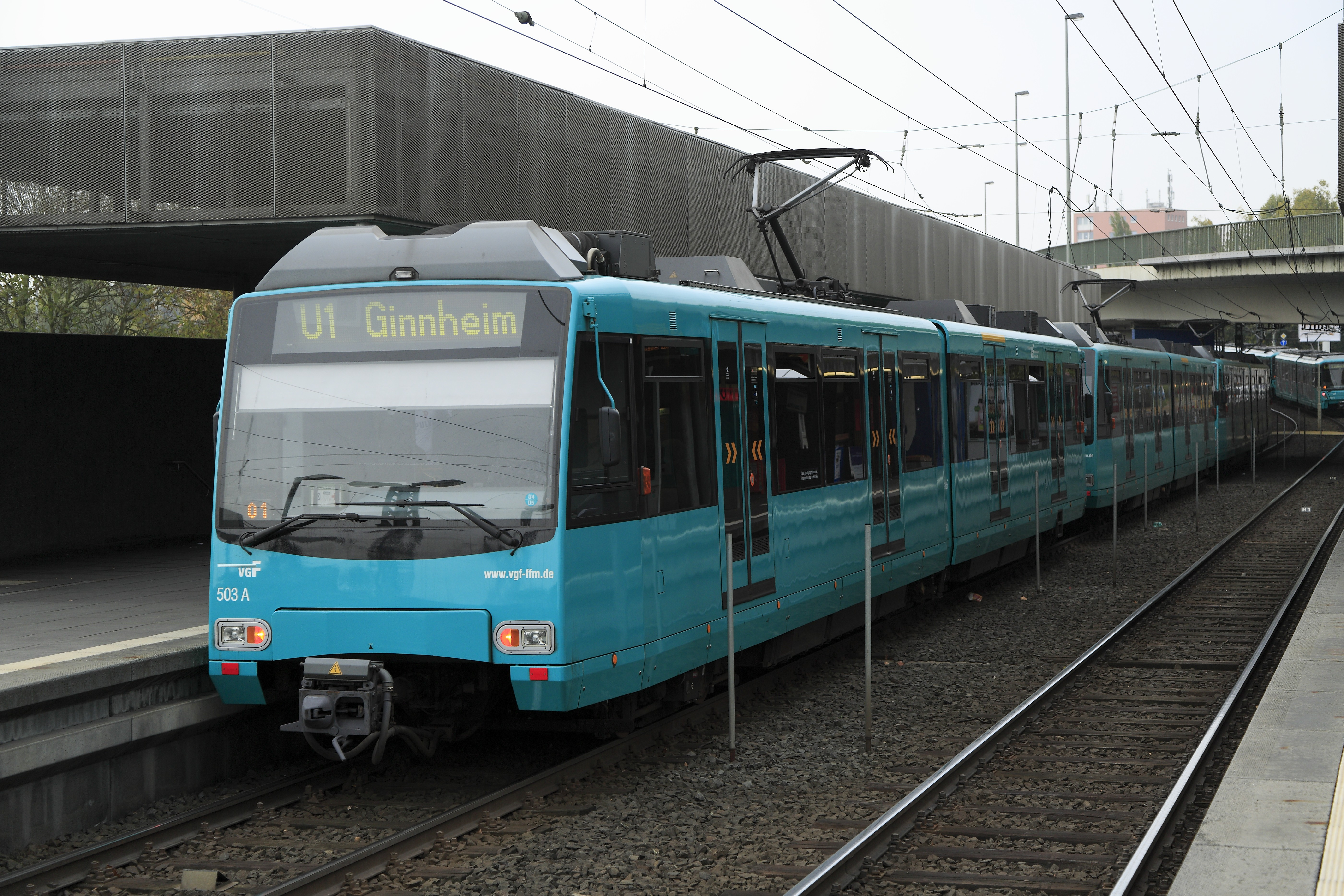 Dreifacheinheit der VGF-Reihe U4, Linie U1 Richtung Ginnheim. Der Streckenast Richtung Ginnheim, der eigentlich zur Stammstrecke D gehört, führt mit einigen Tunnelabschnitten wieder in Richtung Innenstadt. Im Bahnhof Ginnheim besteht ein Übergang zur Straßenbahnlinie 16.